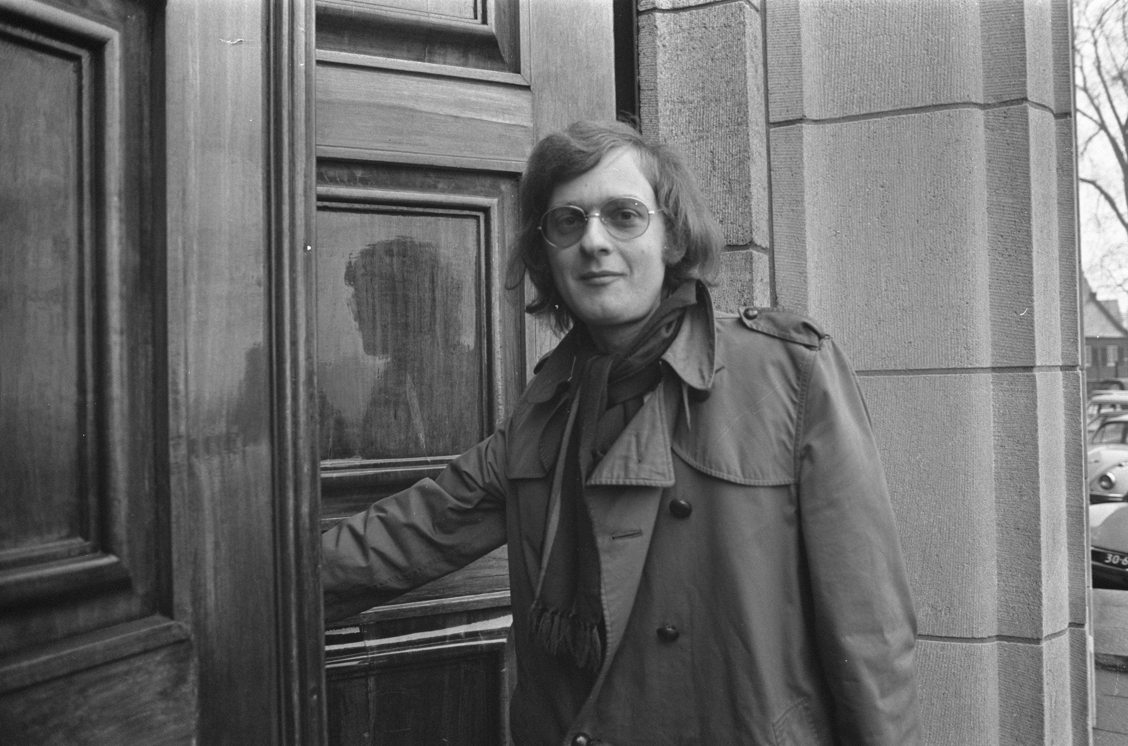 Collectie / Archief : Fotocollectie Anefo Reportage / Serie : [ onbekend ] Beschrijving : Rechtbank in Den Bosch behandelt zaak tegen lid Rode Jeugd , Lucien H. , verdediger mr. Bakker Schut Datum : 29 maart 1973 Locatie : Den Bosch Trefwoorden : rechtbanken, verdedigers Fotograaf : Peters, Hans / Anefo Auteursrechthebbende : Nationaal Archief Materiaalsoort : Negatief (zwart/wit) Nummer archiefinventaris : bekijk toegang 2.24.01.05 Bestanddeelnummer : 926-3079